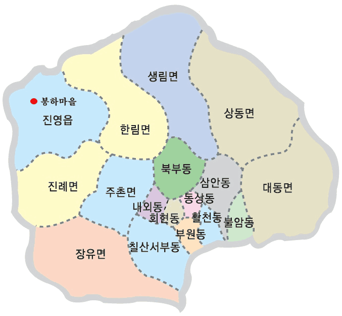 김해시